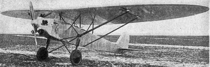 Kalinin K-9, spojovací a sportovní letoun